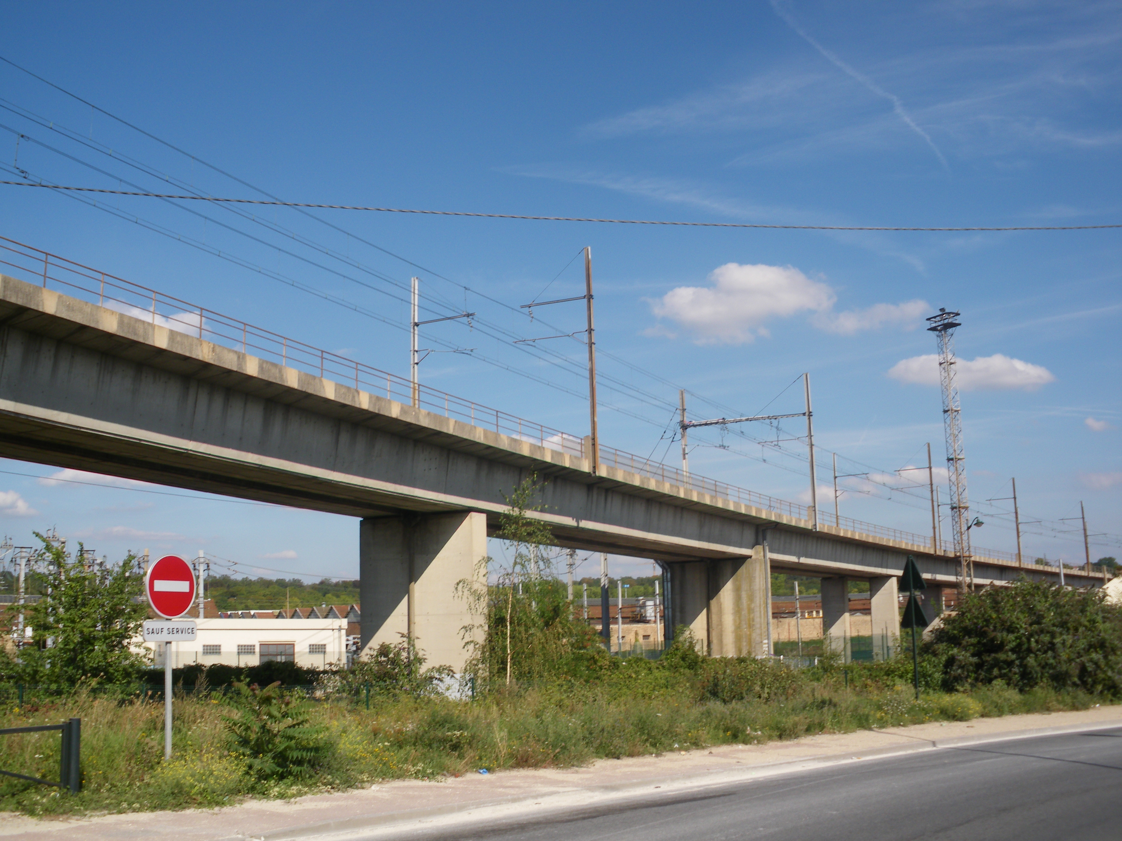 Viaduc ferroviaire de la ligne de "Plateau" du RER D enjambant la N104 à Corbeil-Essonnes.